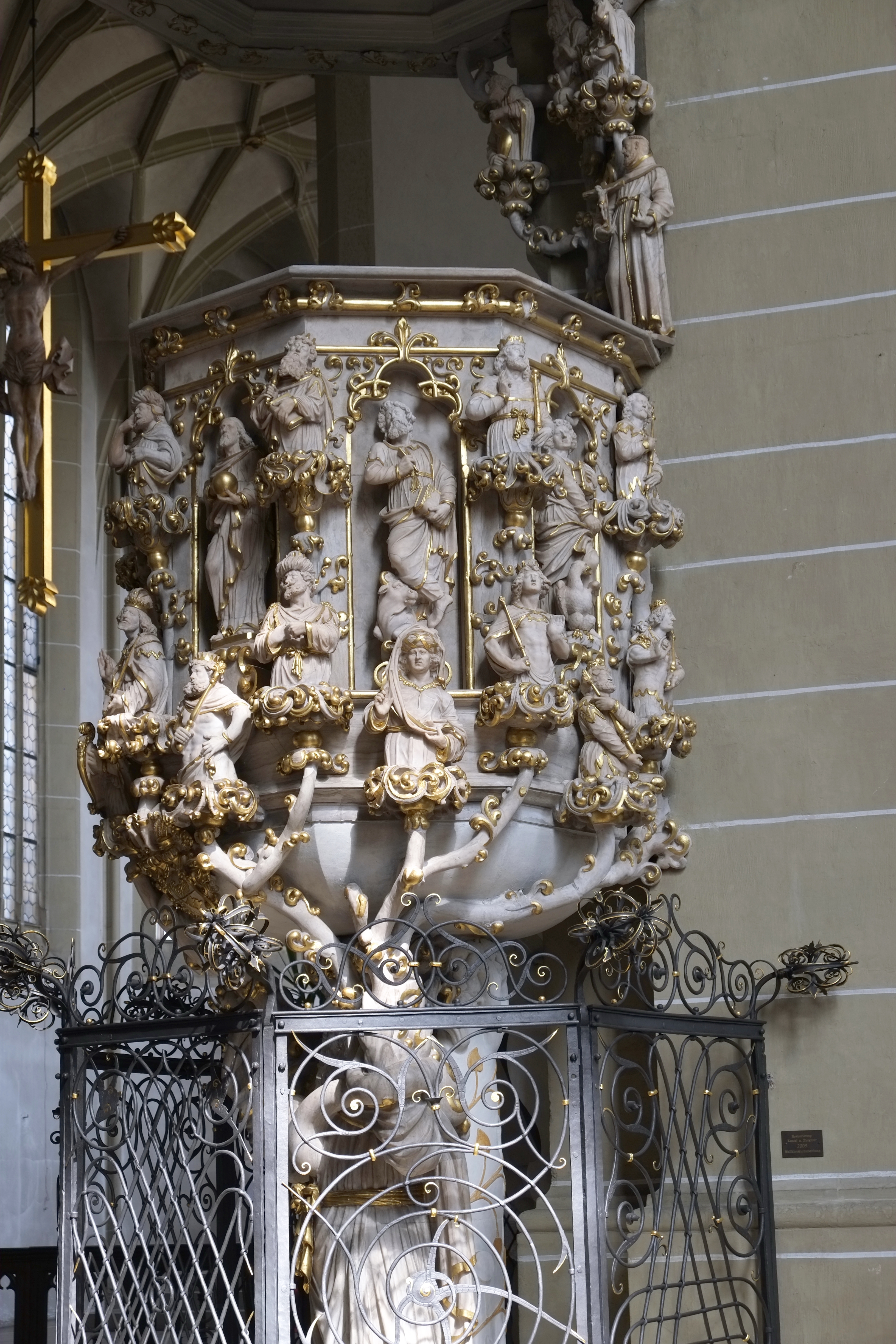 Kanzel in der Wallfahrtskirche Maria im Sand in Dettelbach im Landkreis Kitzingen (Bayern, Deutschland)